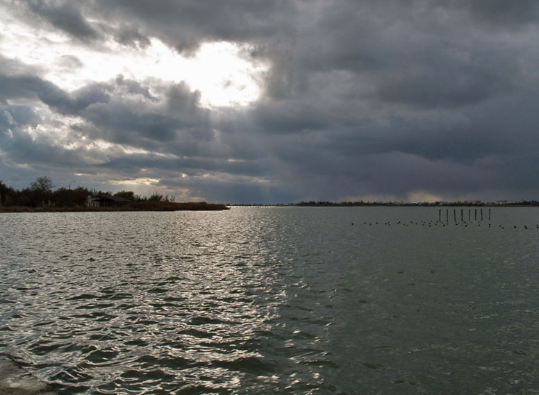 Евпаторийское озеро лиман